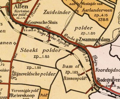 polder Steekt